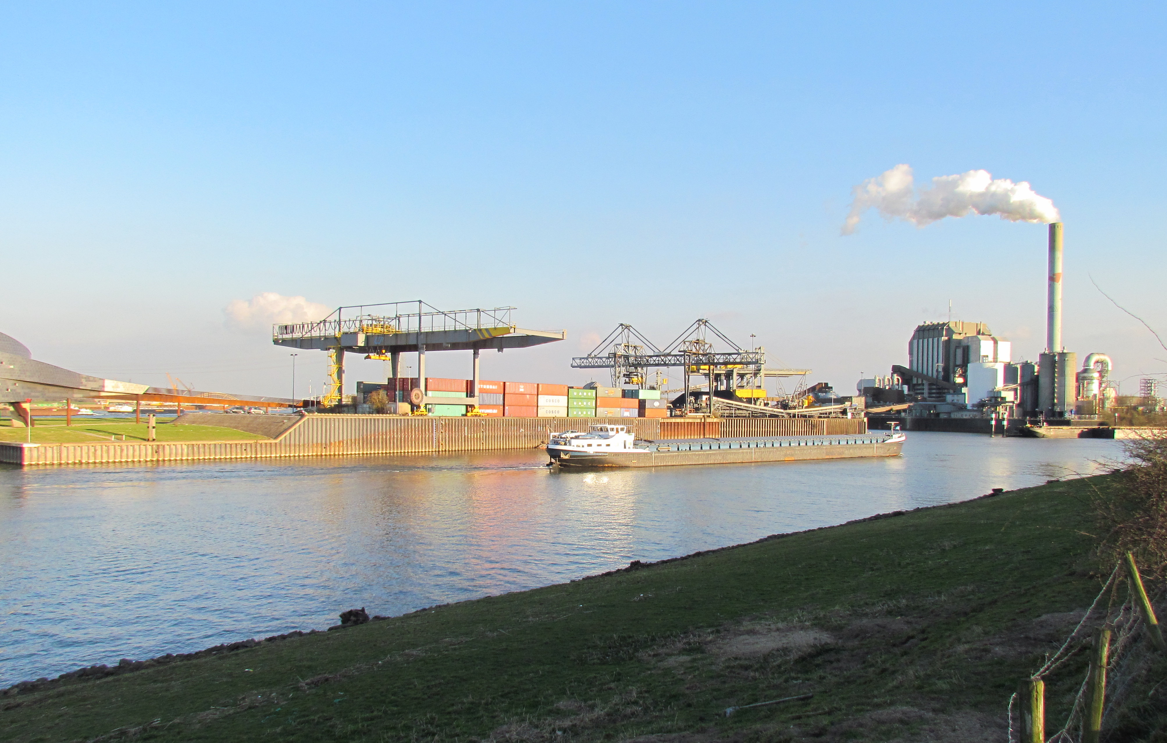 Noordkanaalhaven aan het Maas-Waalkanaal in Nijmegen. Links de containeroverslag, rechts de Elektriciteitscentrale Gelderland